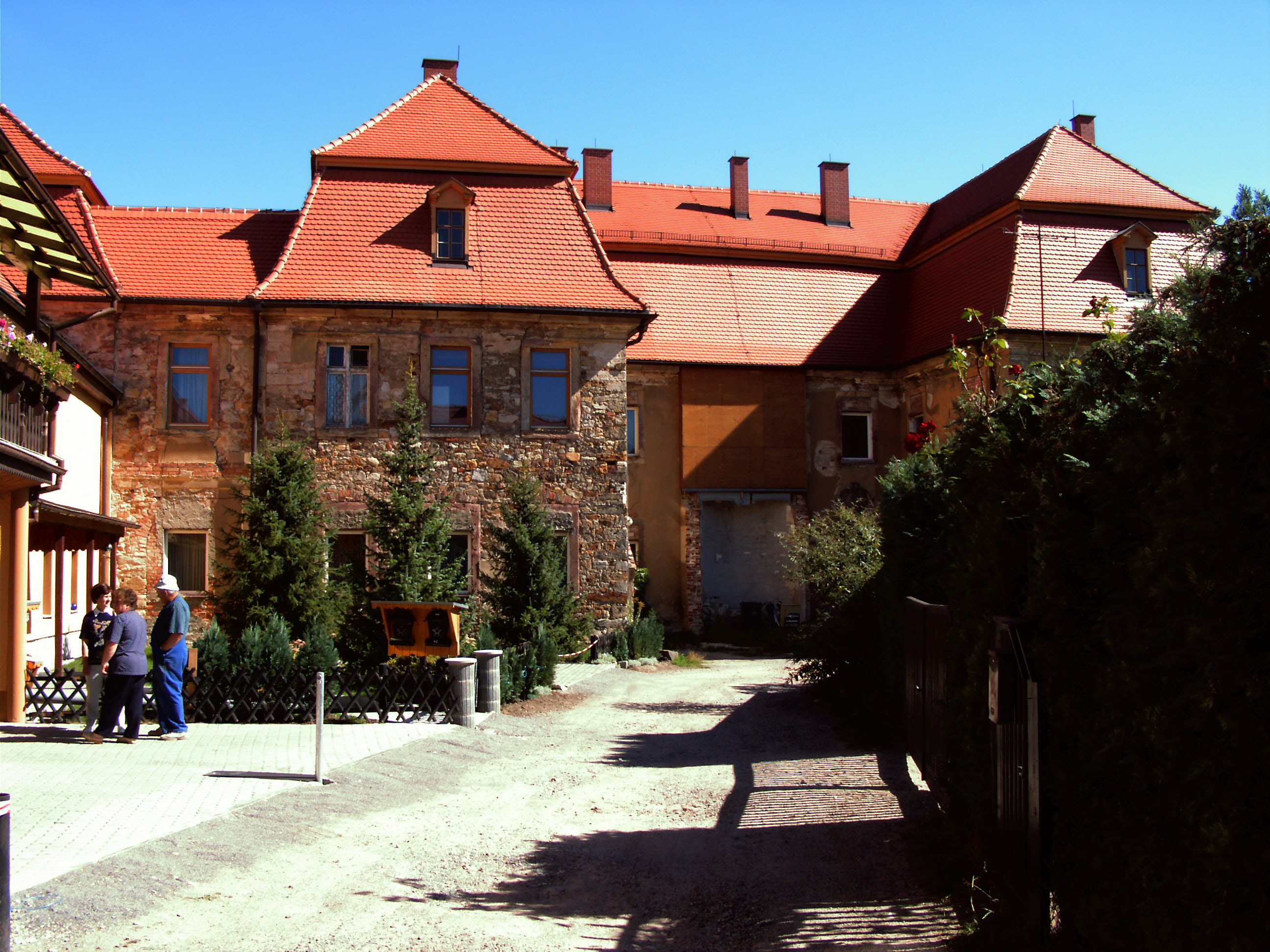 Das Schlösschen" in Holleben, Vorderansicht